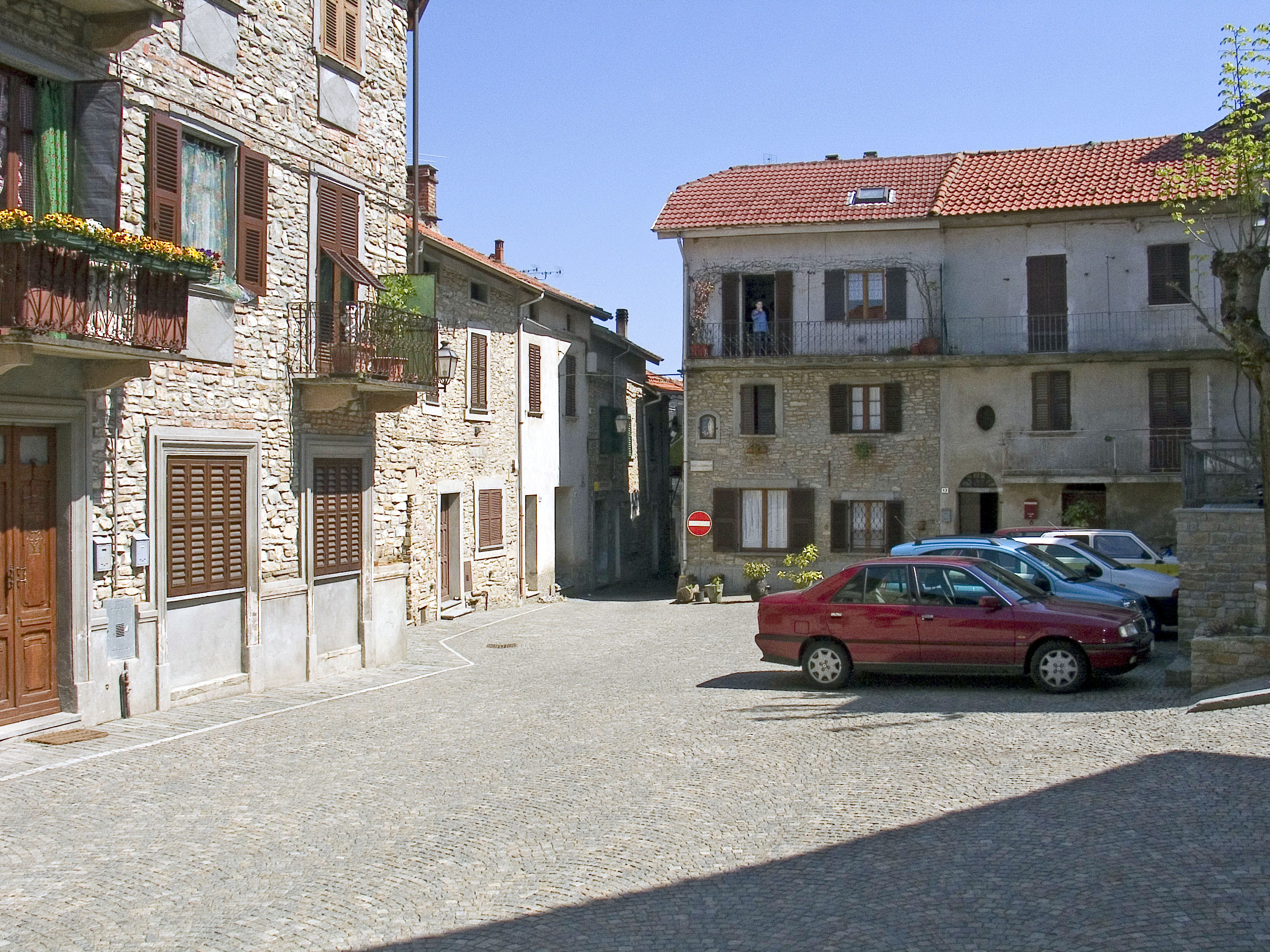 Piccolo scorcio di piazza Garibaldi in , Italia